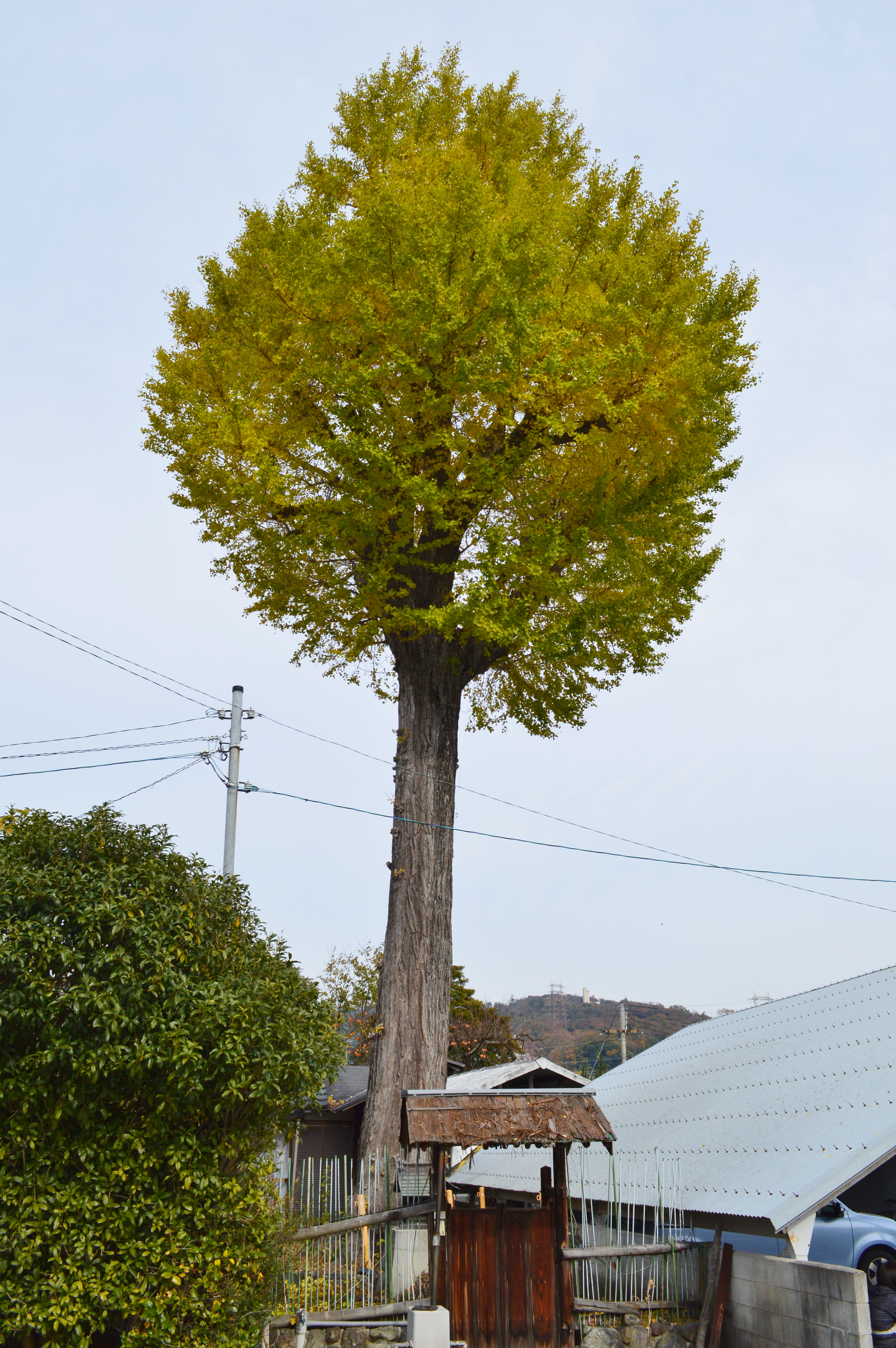 茨木市 乾邸のいちょう